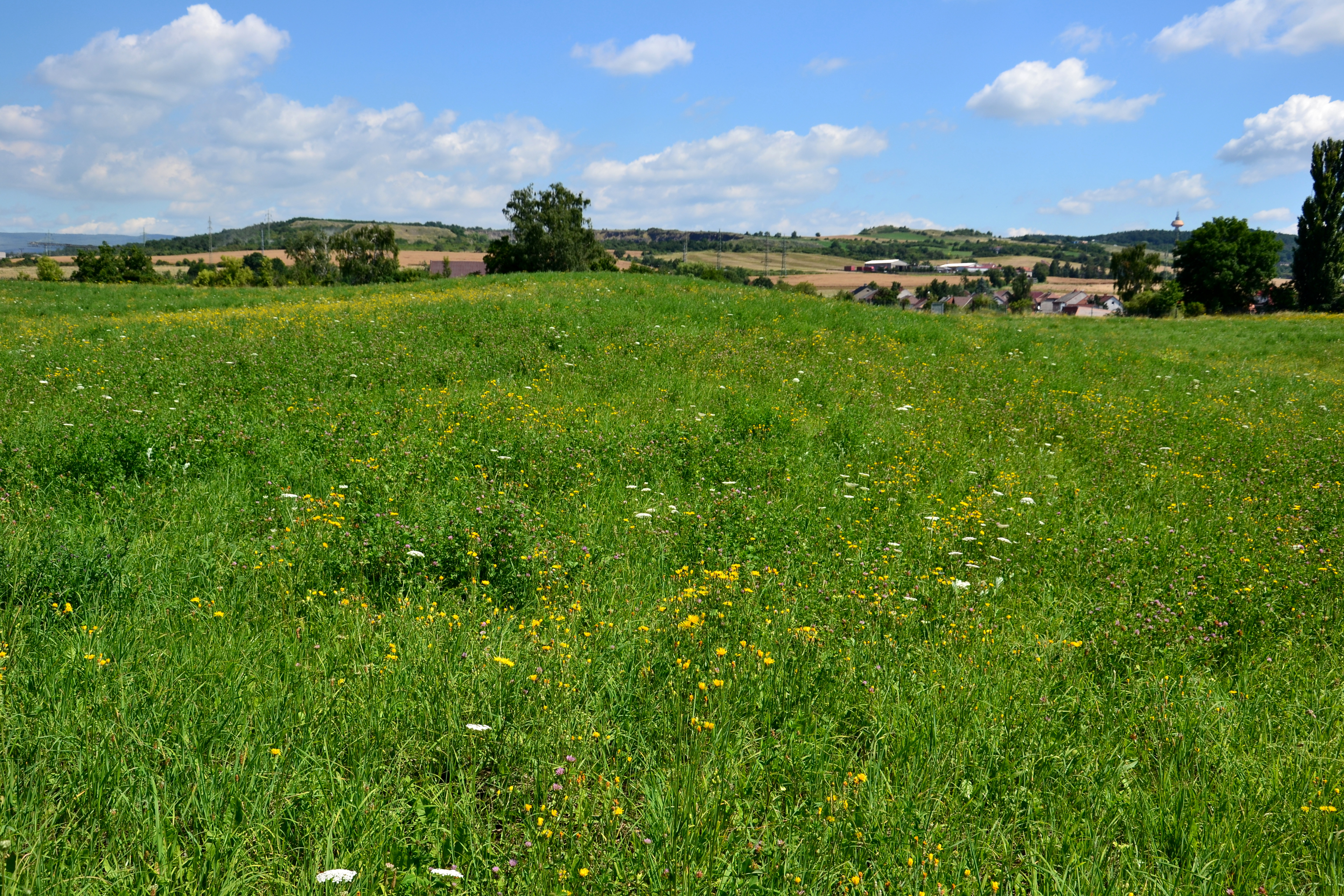 Slovanské hradiště, u vsi, Zabrušany. Val mezi předhradím a střední částí